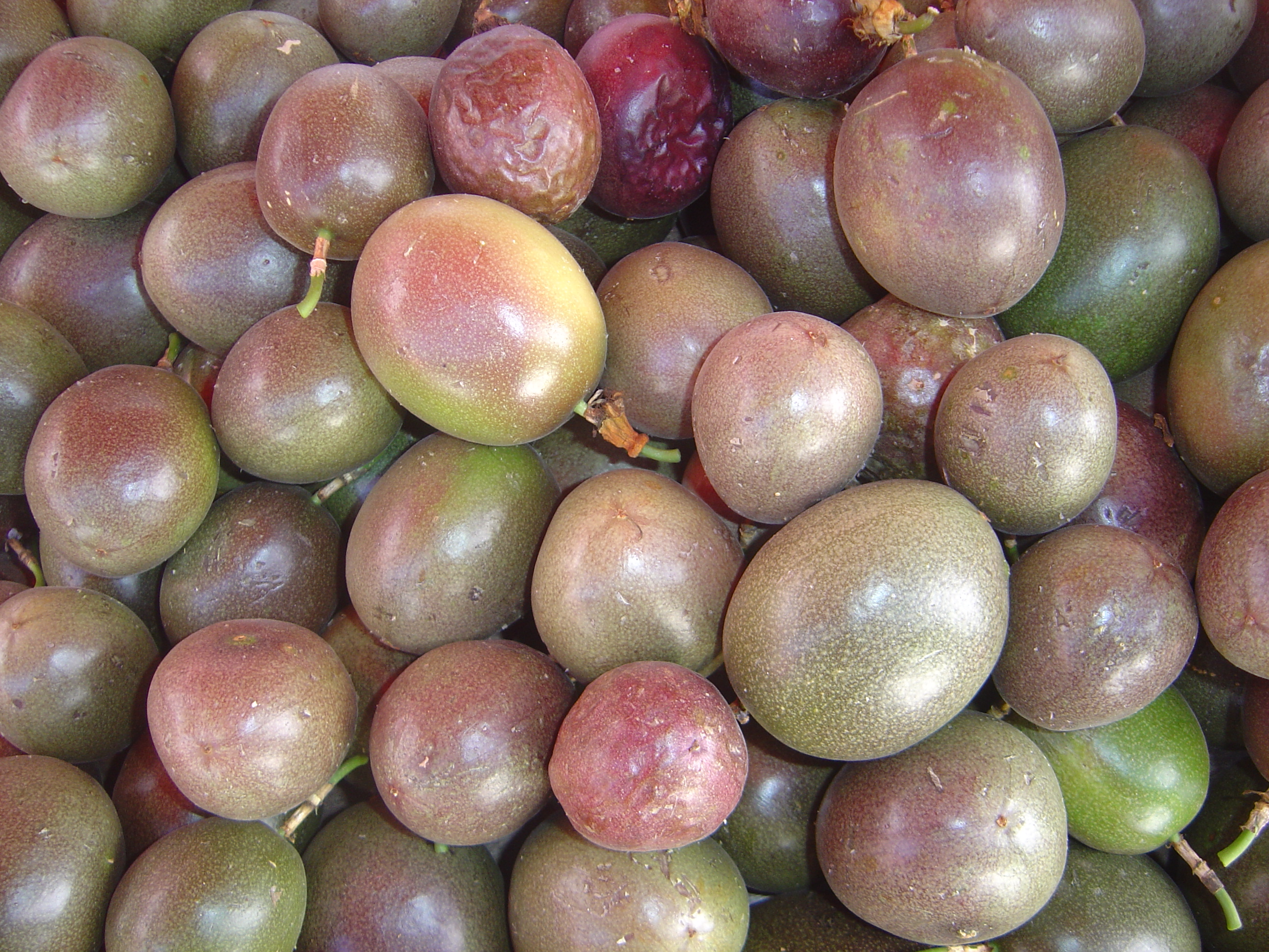 Passiflora edulis Île de la Réunion